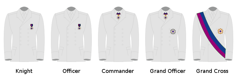 Order of the Beligan Cross